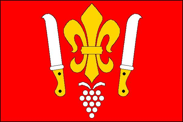 Vlajka obce Vranovice v okrese Brno-venkov